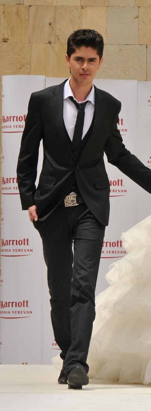 Դավիթ Ղարիբյան